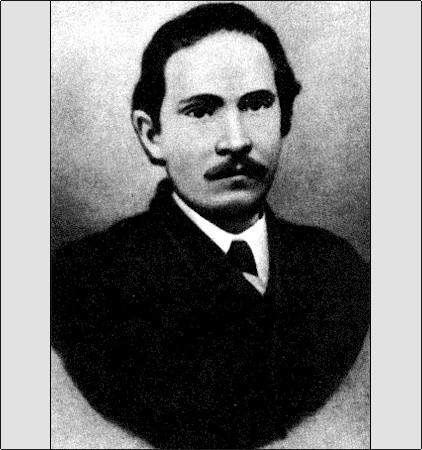 Ткачёв Пётр Никитич - русский литературный критик и публицист,идеолог якобинского направления в народничестве.